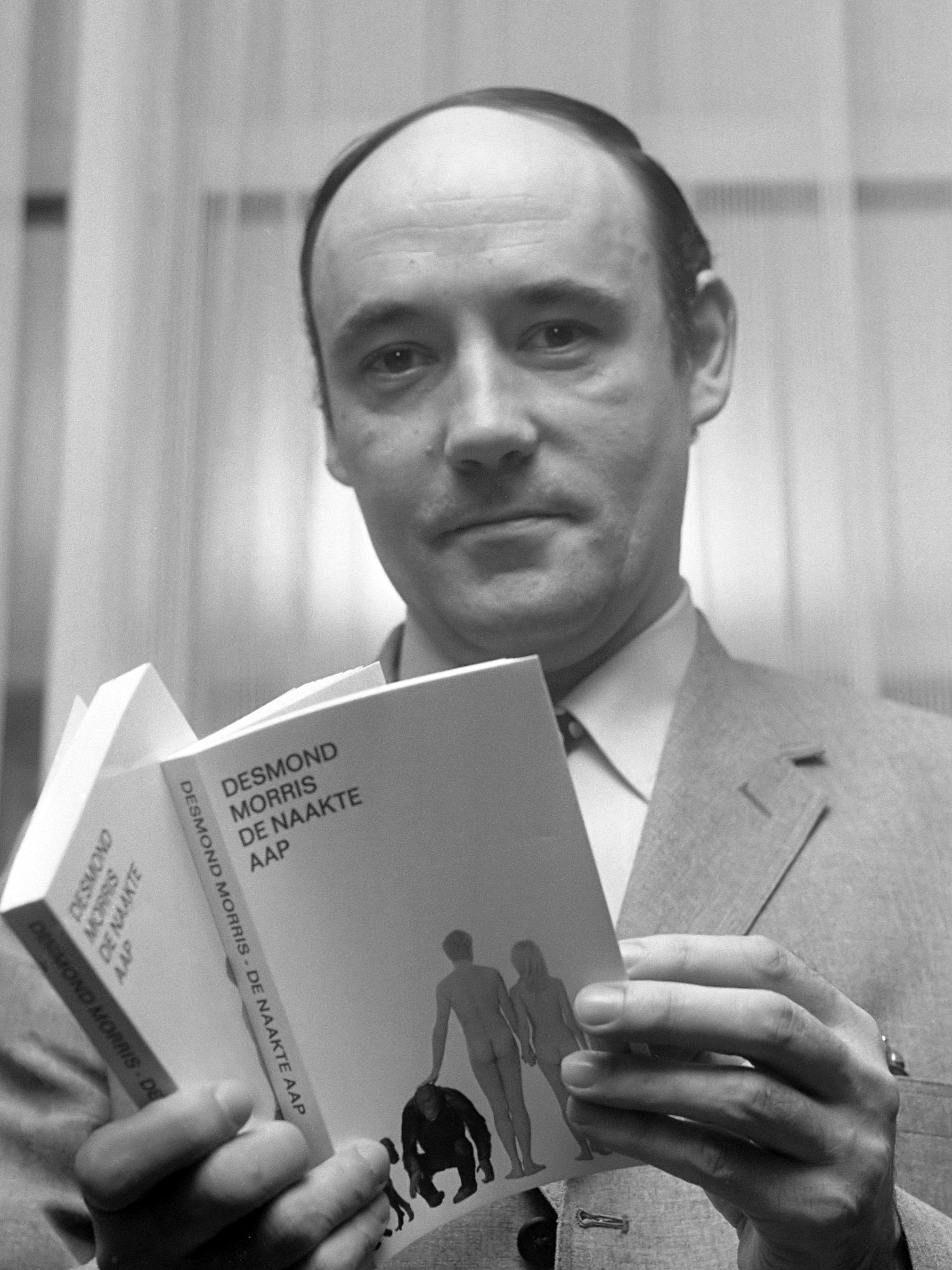 Desmond Morris (Amerikaan) met zijn boek "De Naakte Aap in Amsterdam 5 november 1969